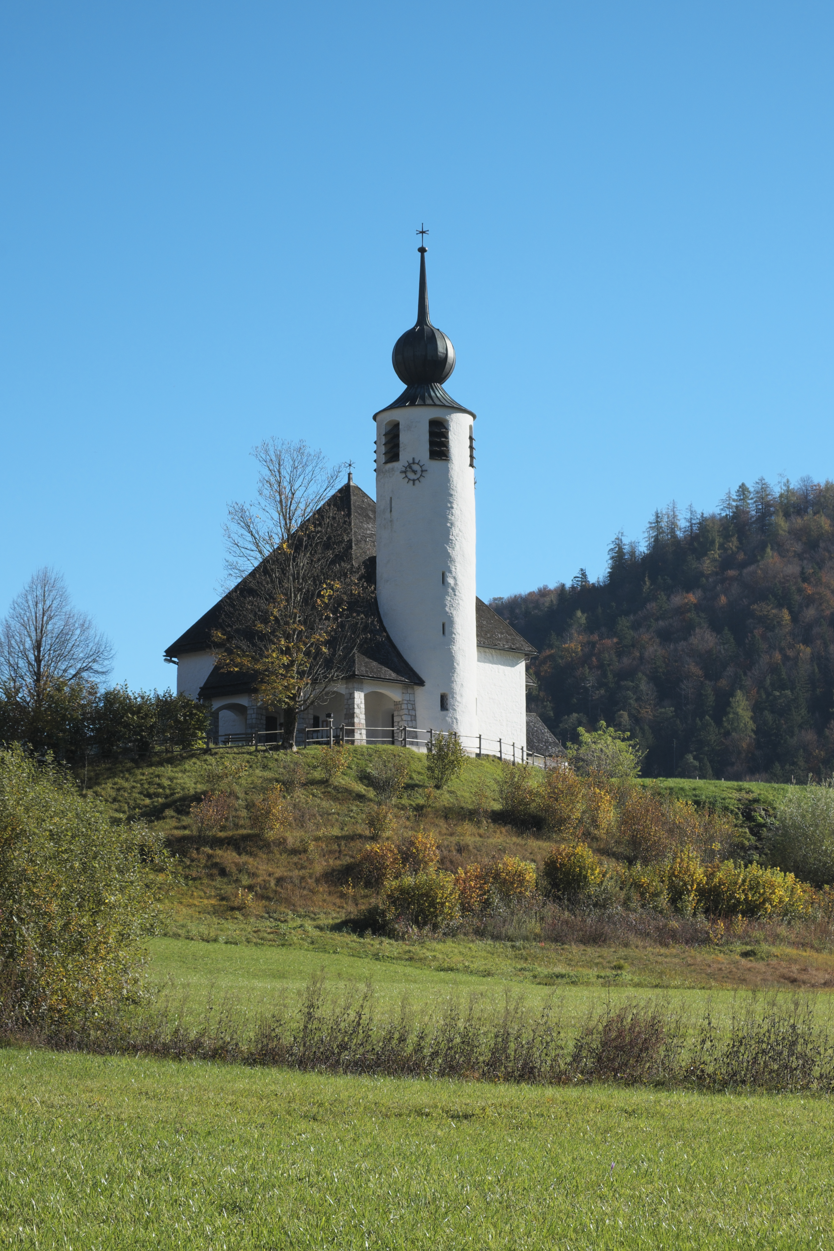 Katholische Filialkirche St. Vinzenz in Weißbach an der Alpenstraße (Schneizlreuth) im Landkreis Berchtesgadener Land (Bayern/Deutschland)